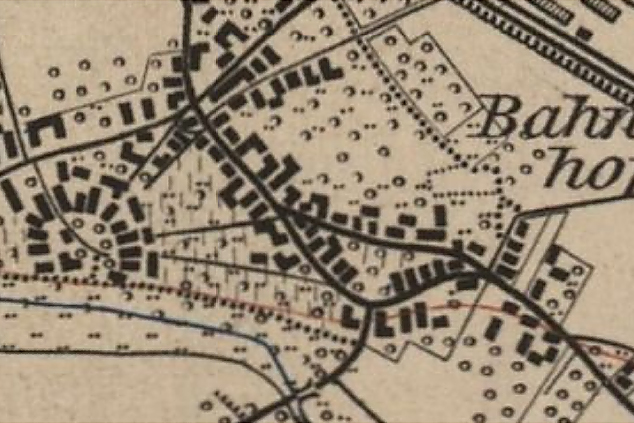 Radebeul Karte 1893